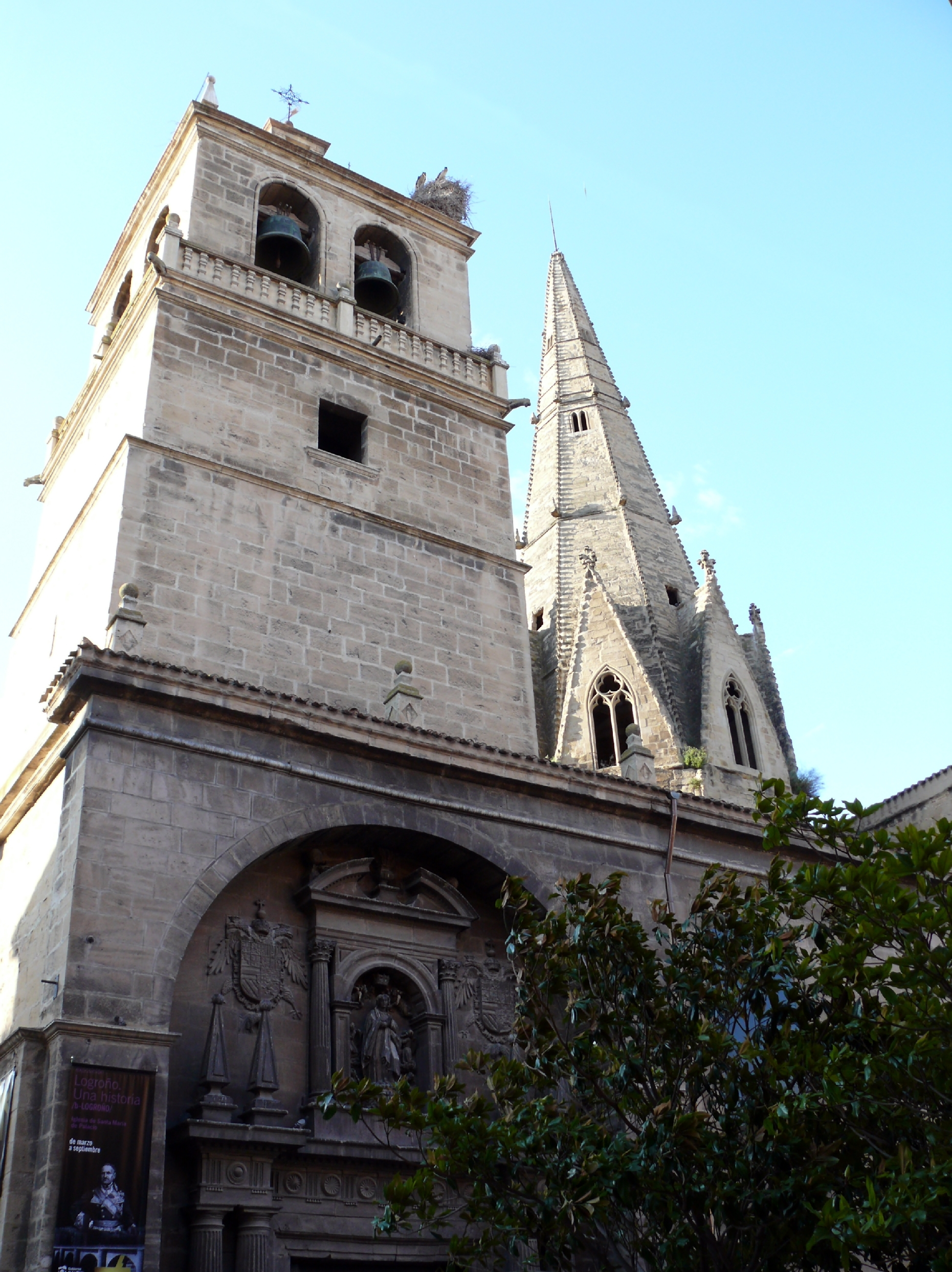 Vista exterior de la Iglesia Santa Maria de Palacio.